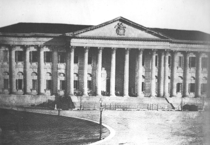 Palazzo Barbieri in una foto del 1859